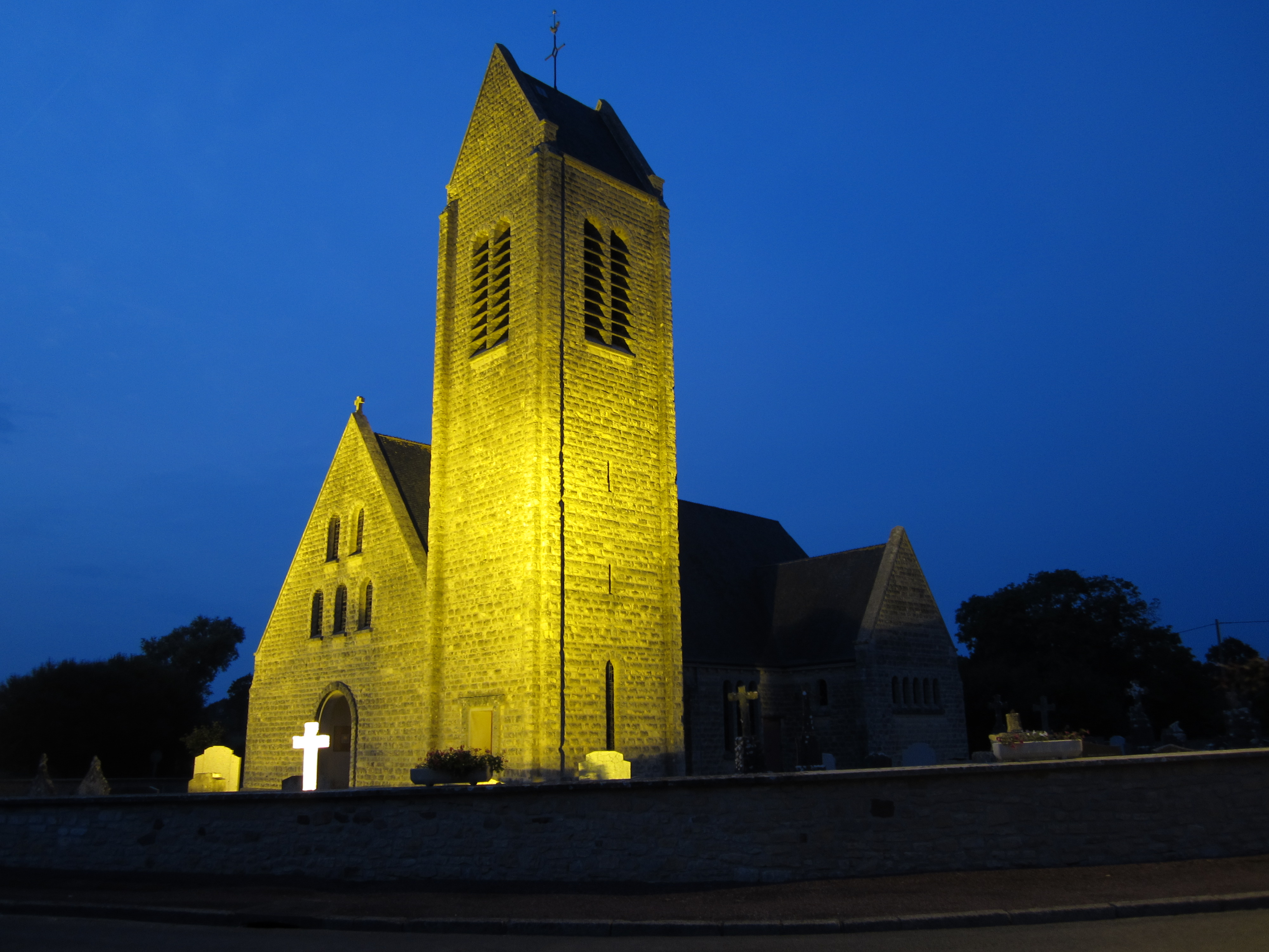 église Saint-Georges de Raids